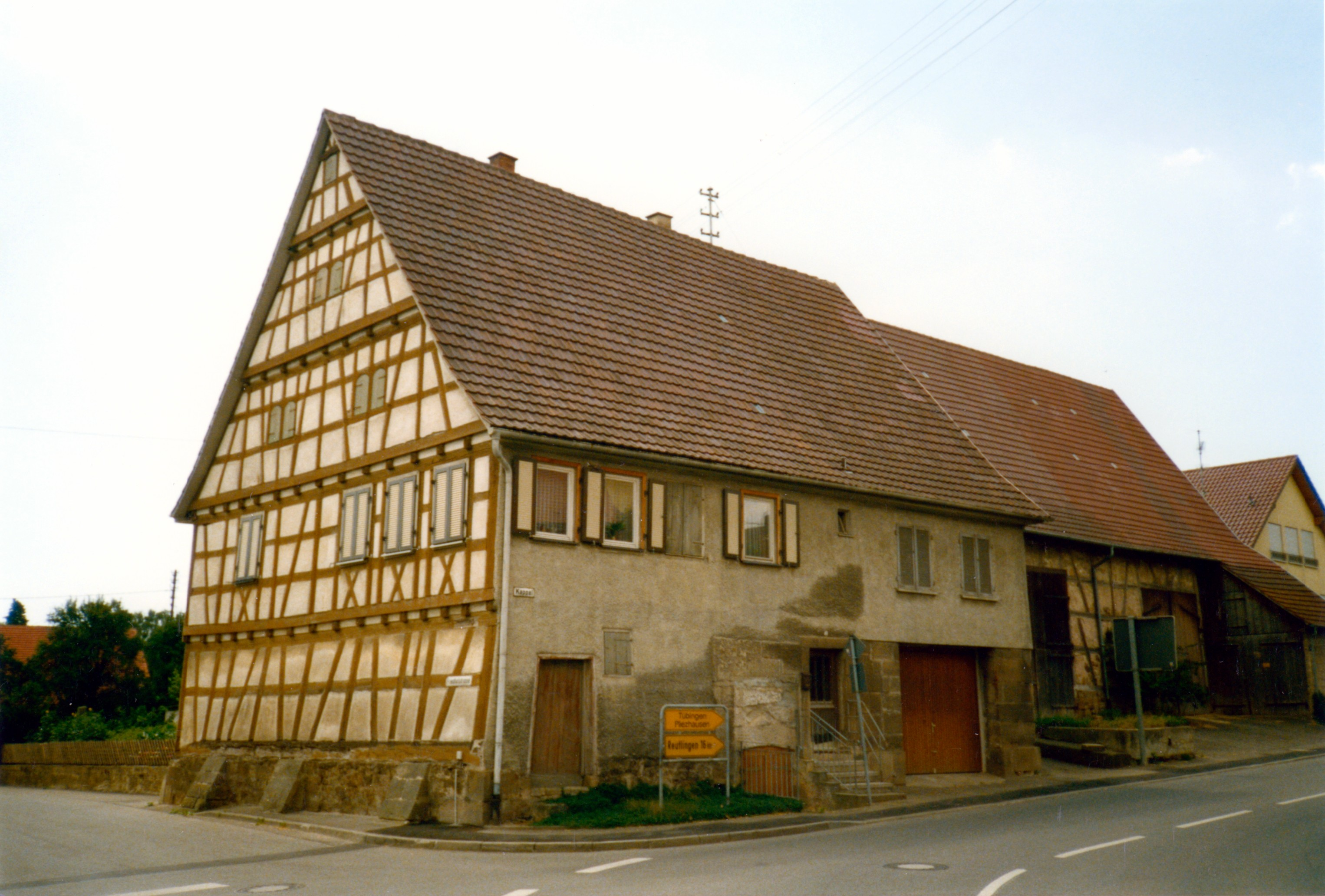 Walddorfhäslach Fachwerkhaus 1794 Kappel